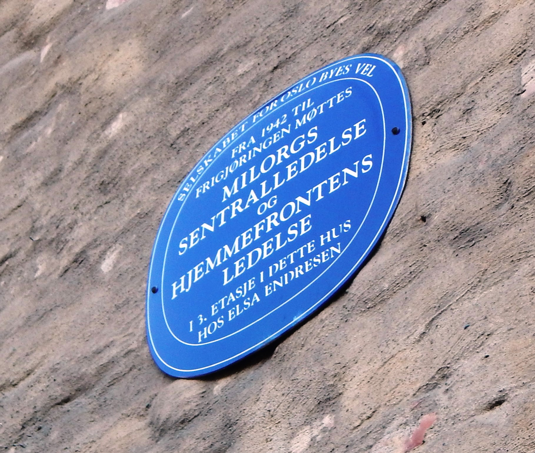 Milorg/Hjemmefronten hadde møter hos Elsa Endresen i 3. etasje i Gabels gate 39 i en årrekke. Minneplakett på husveggen.